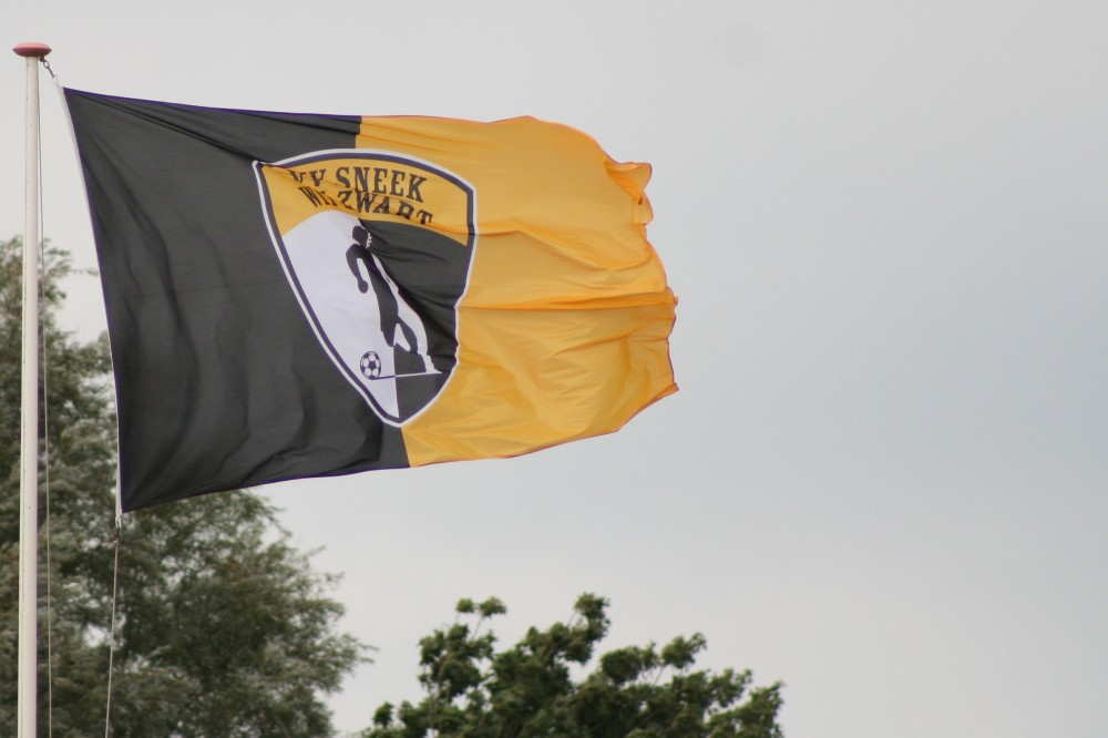 Clubvlag van voetbalvereniging Sneek Wit Zwart